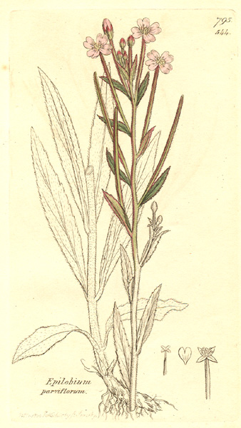 Epilobium parviflorum, de: Kleinblütiges Weidenröschen, cs: Vrbovka Malokvětá